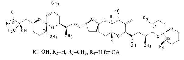 acide okadaïque, cyanotoxine